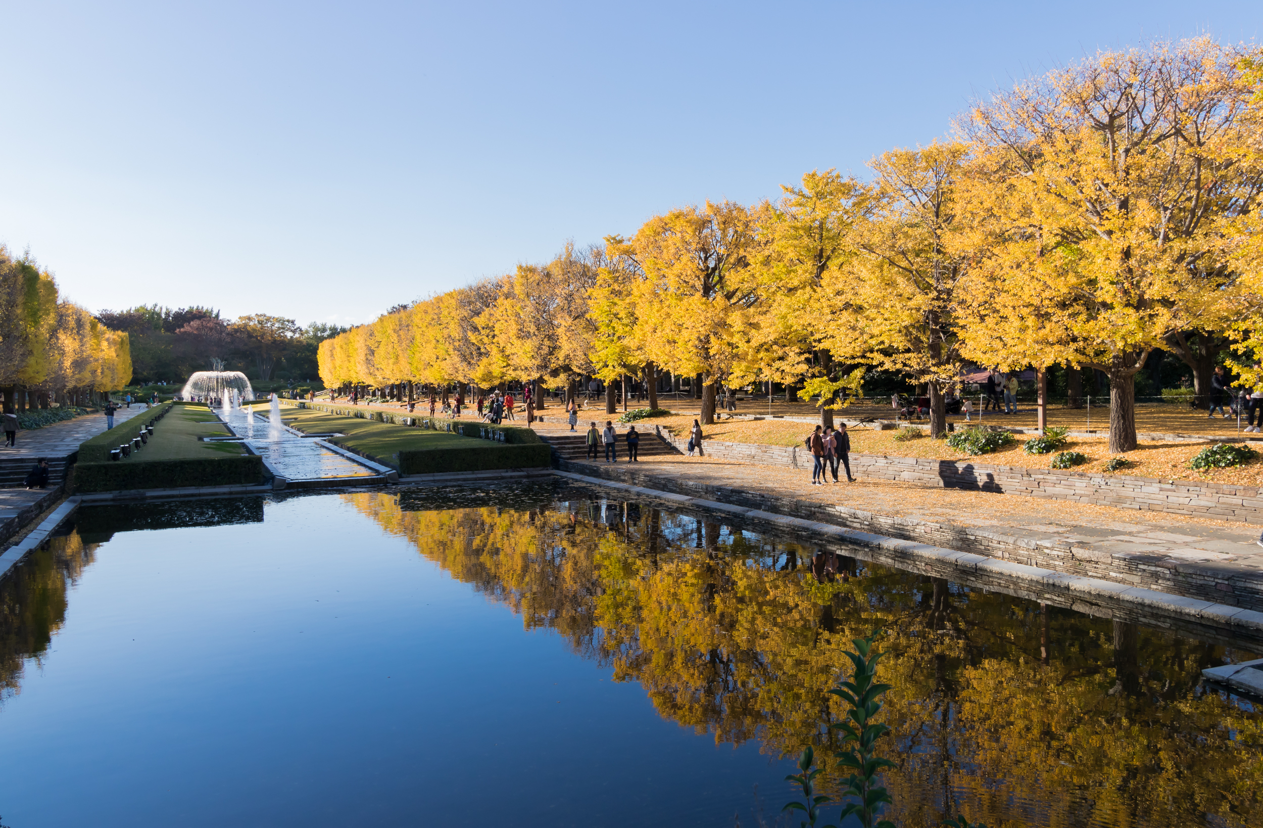 昭和記念公園イチョウ並木